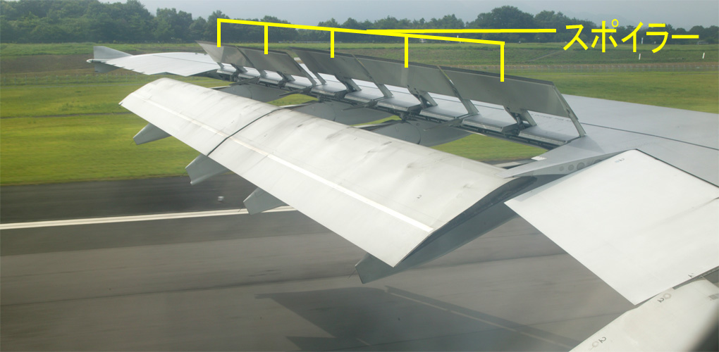 A300-600R Spoilers